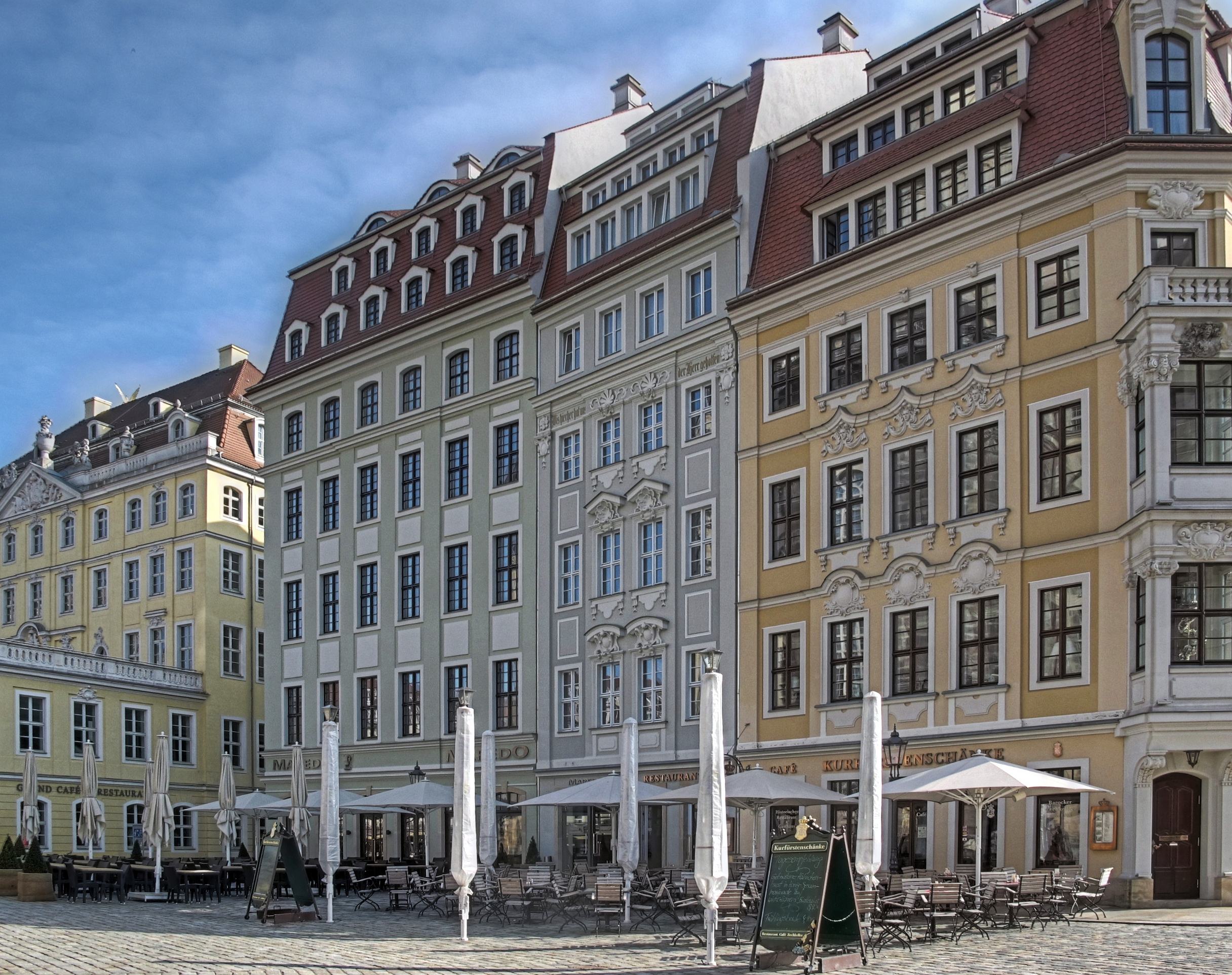 Deutschland, Dresden, Quartier II, An der Frauenkirche 13 und 14